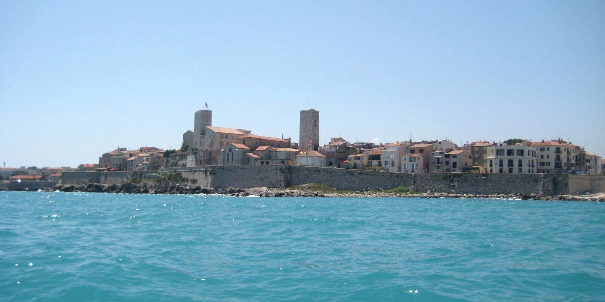 Description vue generale vieil Antibes bateau vue generale vieil Antibes bateau